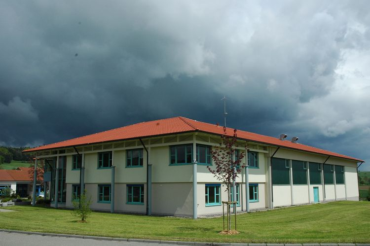 Das Rathaus in Dettighofen.